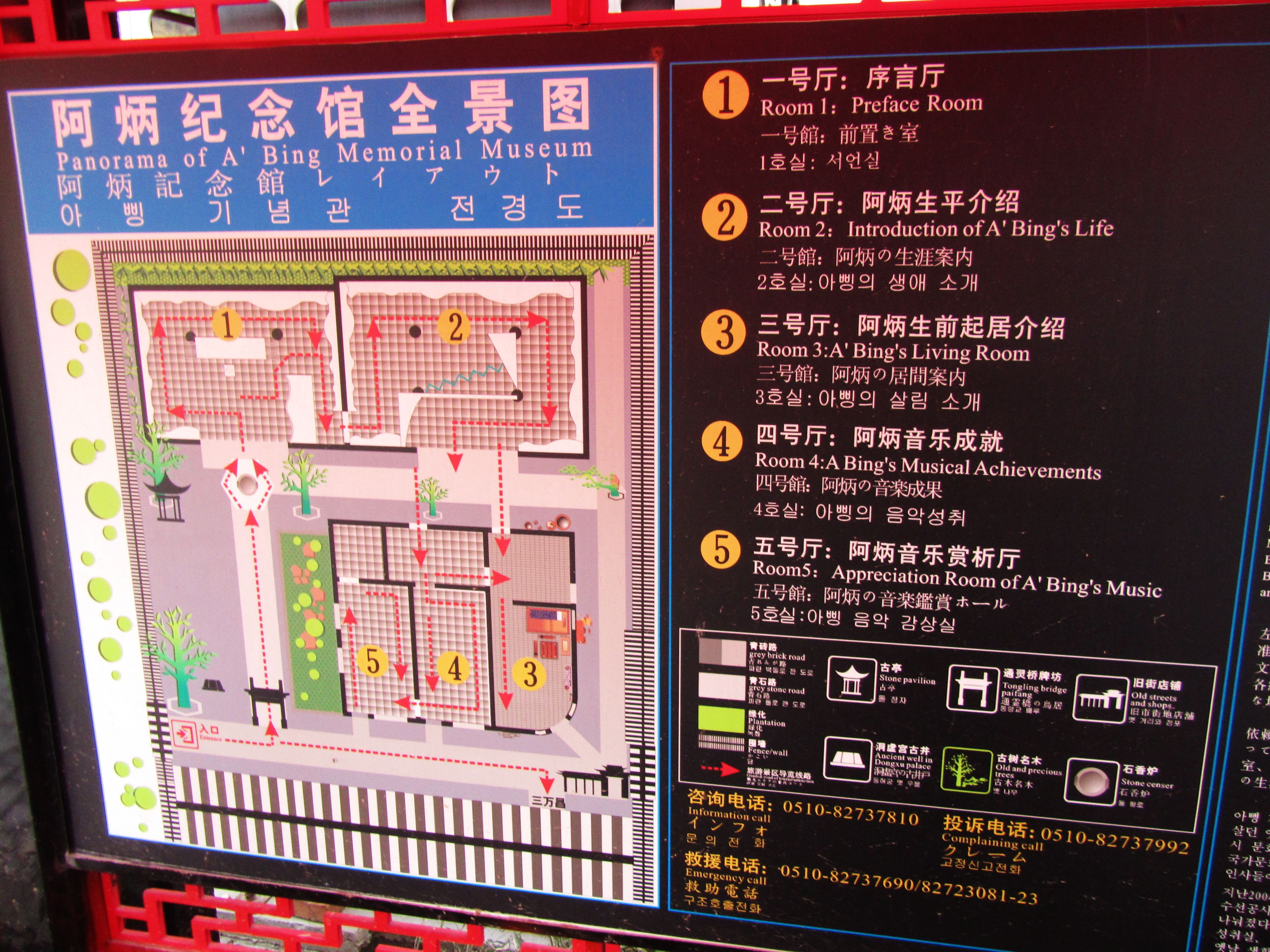 阿炳故居，平面图。